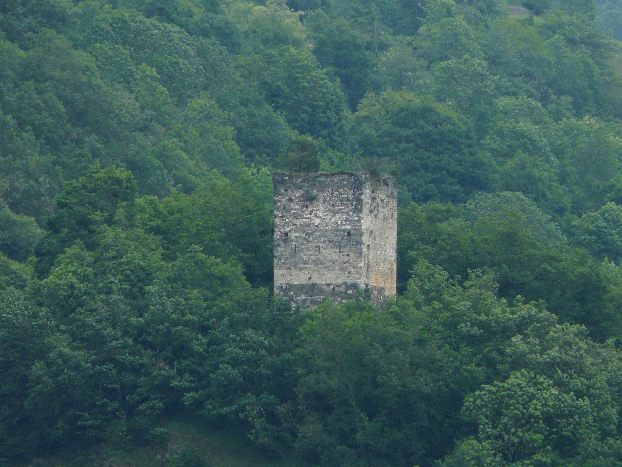 Tour à signaux au nord du village de Lez, Haute-Garonne, France.